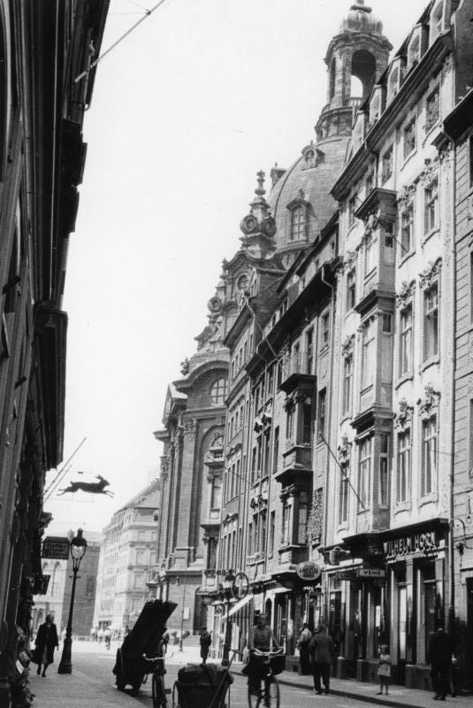 Dresden, Sachsen Rampesche Strasse 7